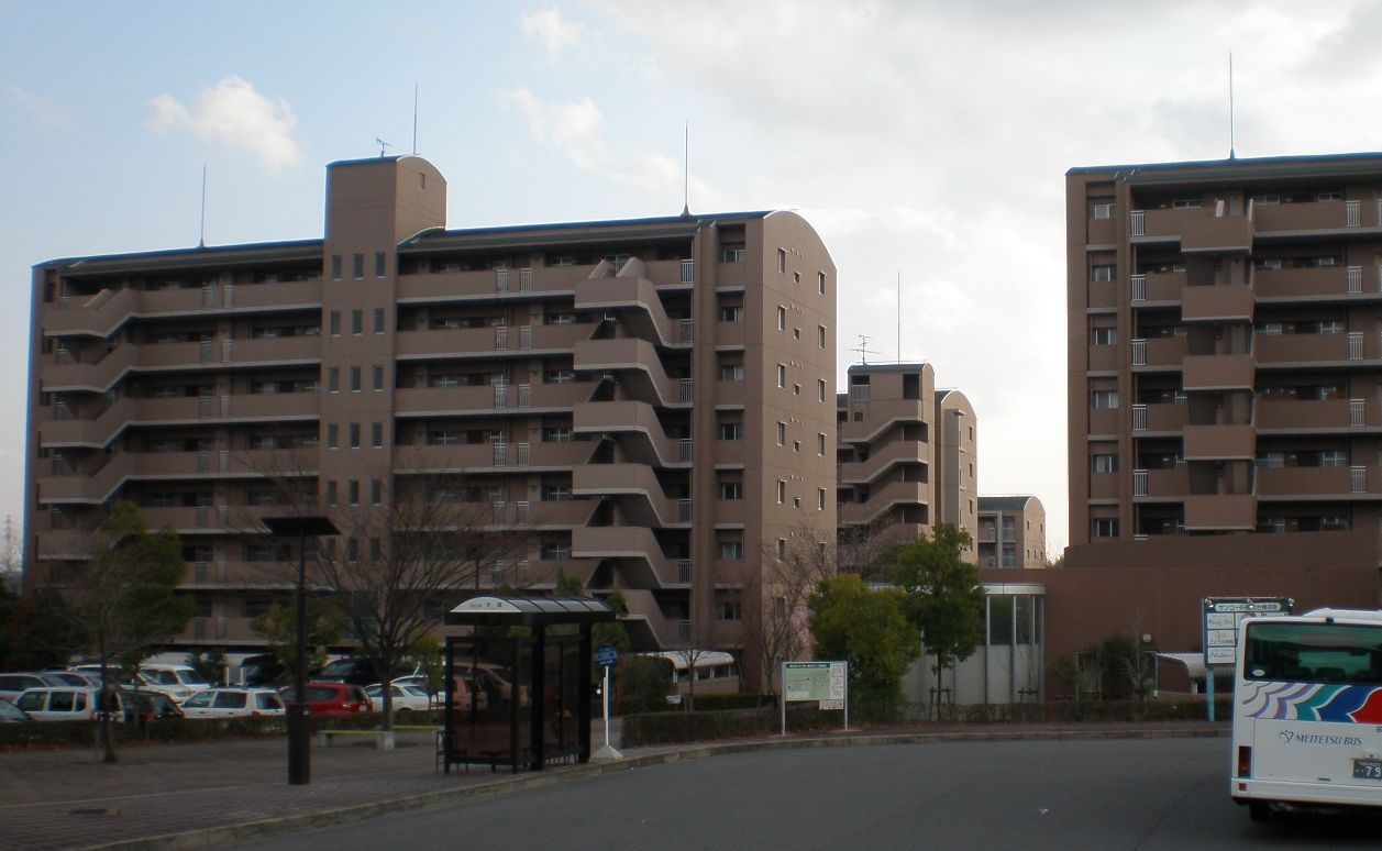 愛知県小牧市にあるサンコート桃花台